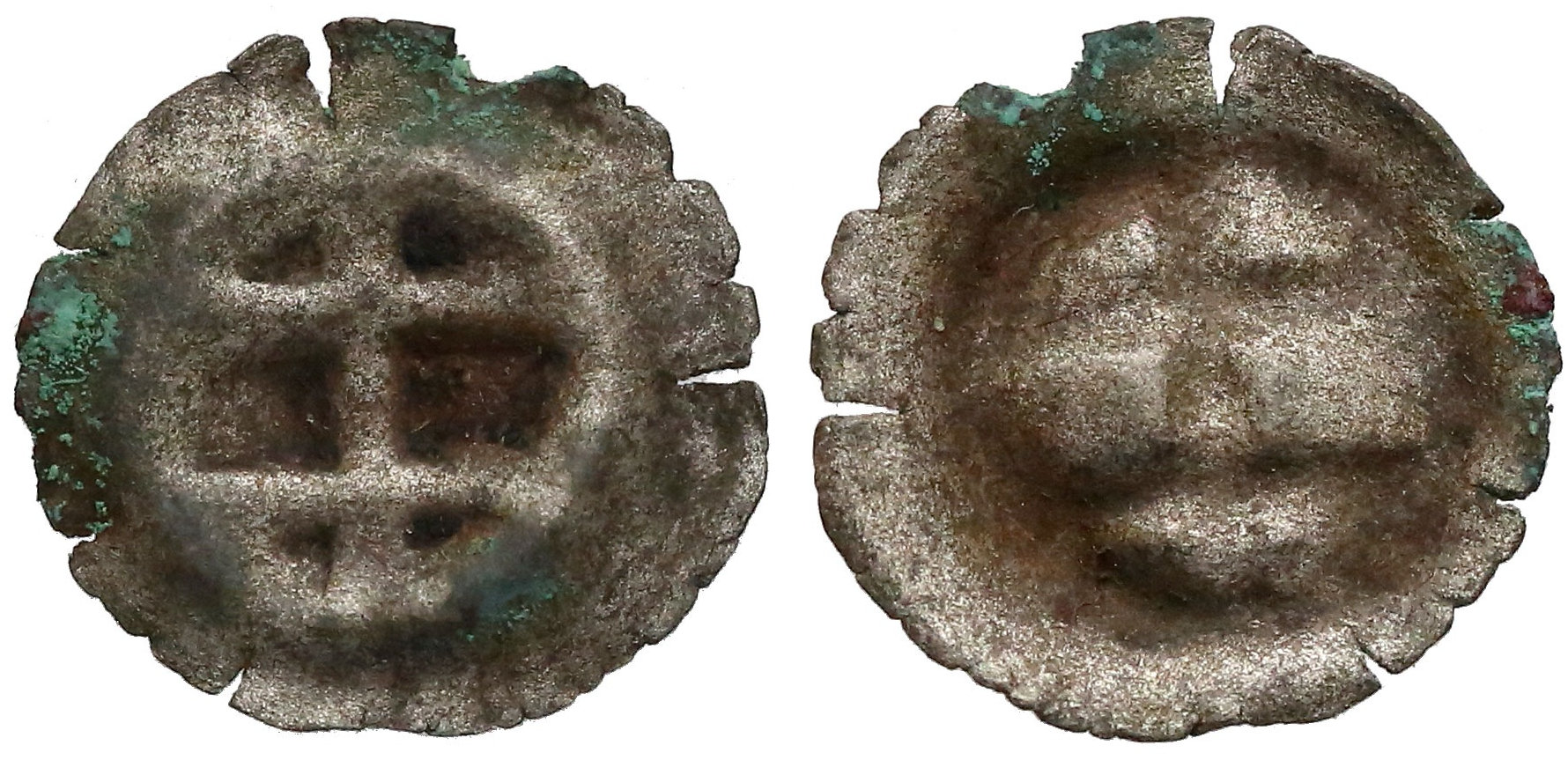 Brakteat miejski Toruń Kazimierz Jagiellończyk